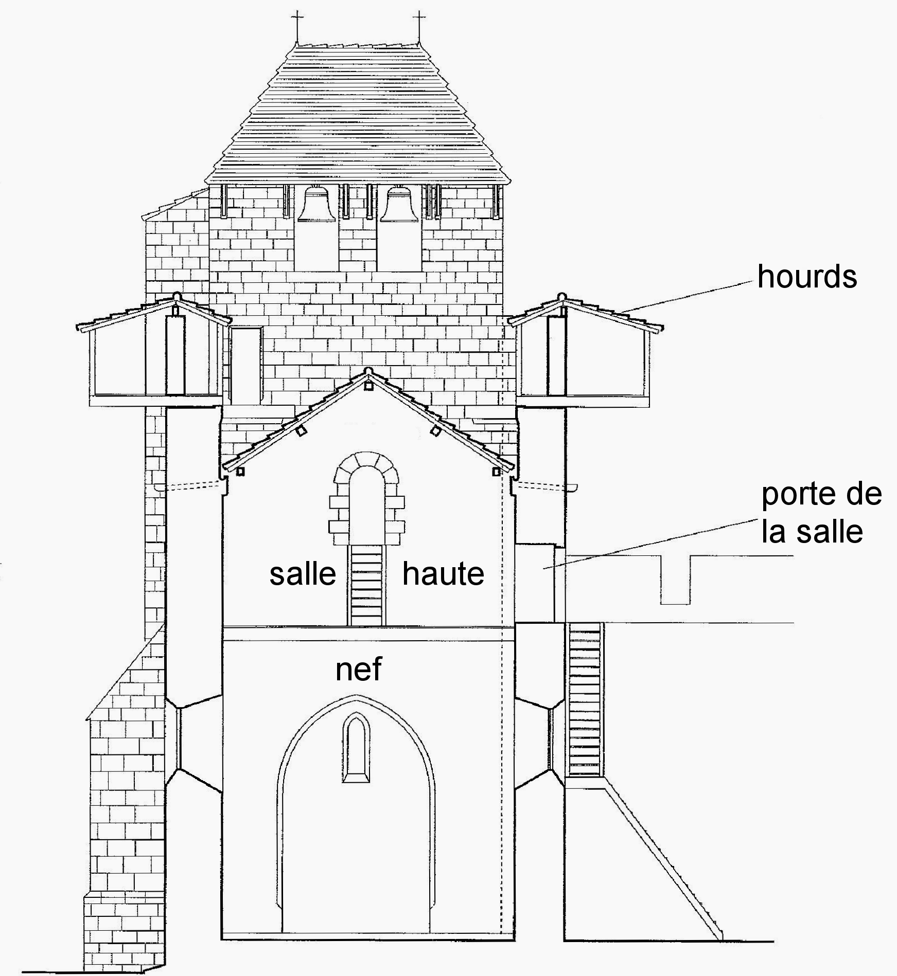 Eglise de Villeneuve de Mézin (france, 47) au XIIIème siècle